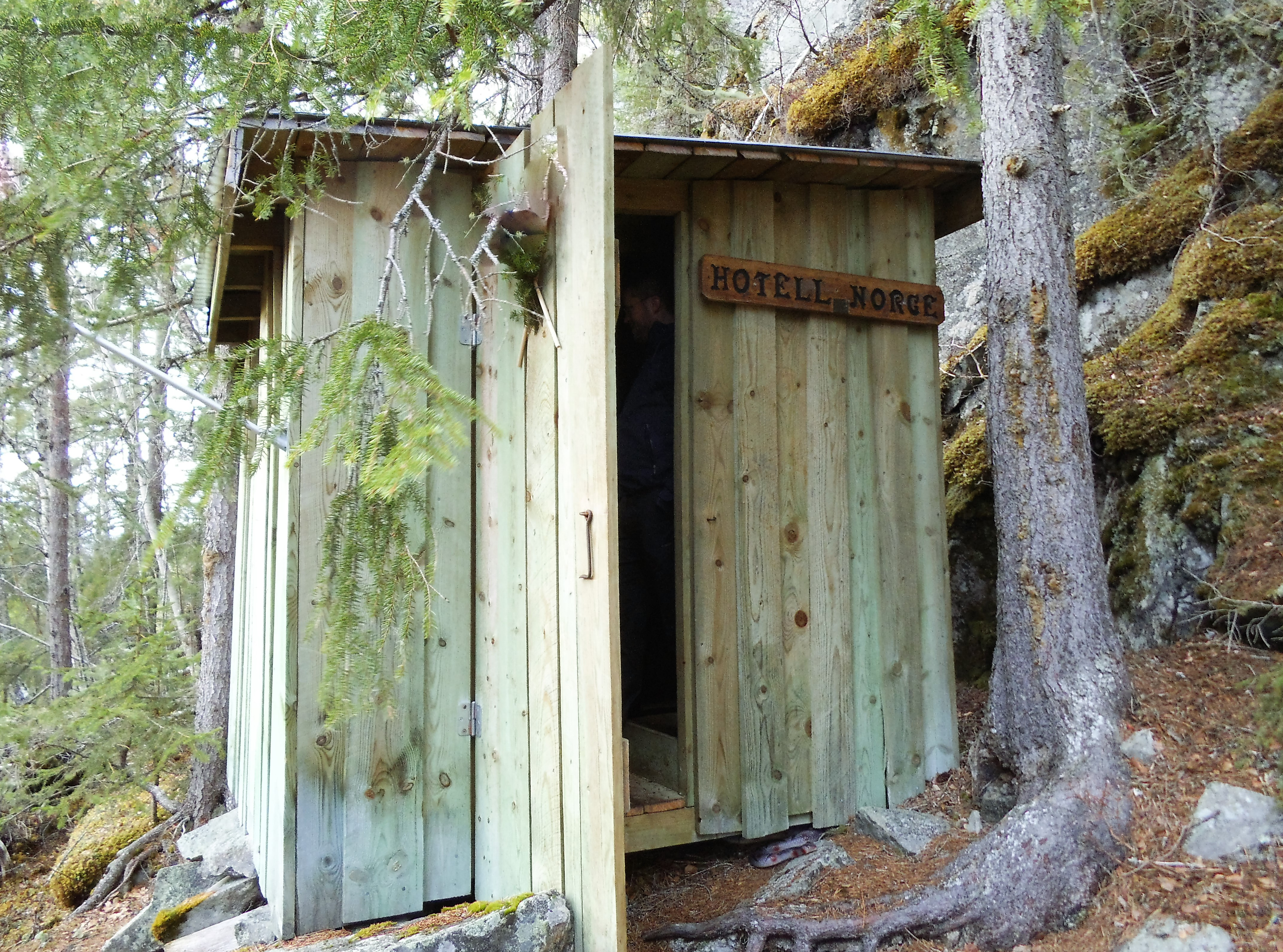 Bygningen på Hølonda som ble kalt "Hotell Norge" og som var skjulested for sabotørene. Bygningen ble satt opp av en lokal gårdbruker i 1944. Dette er en rekonstruert versjon fra 1985.